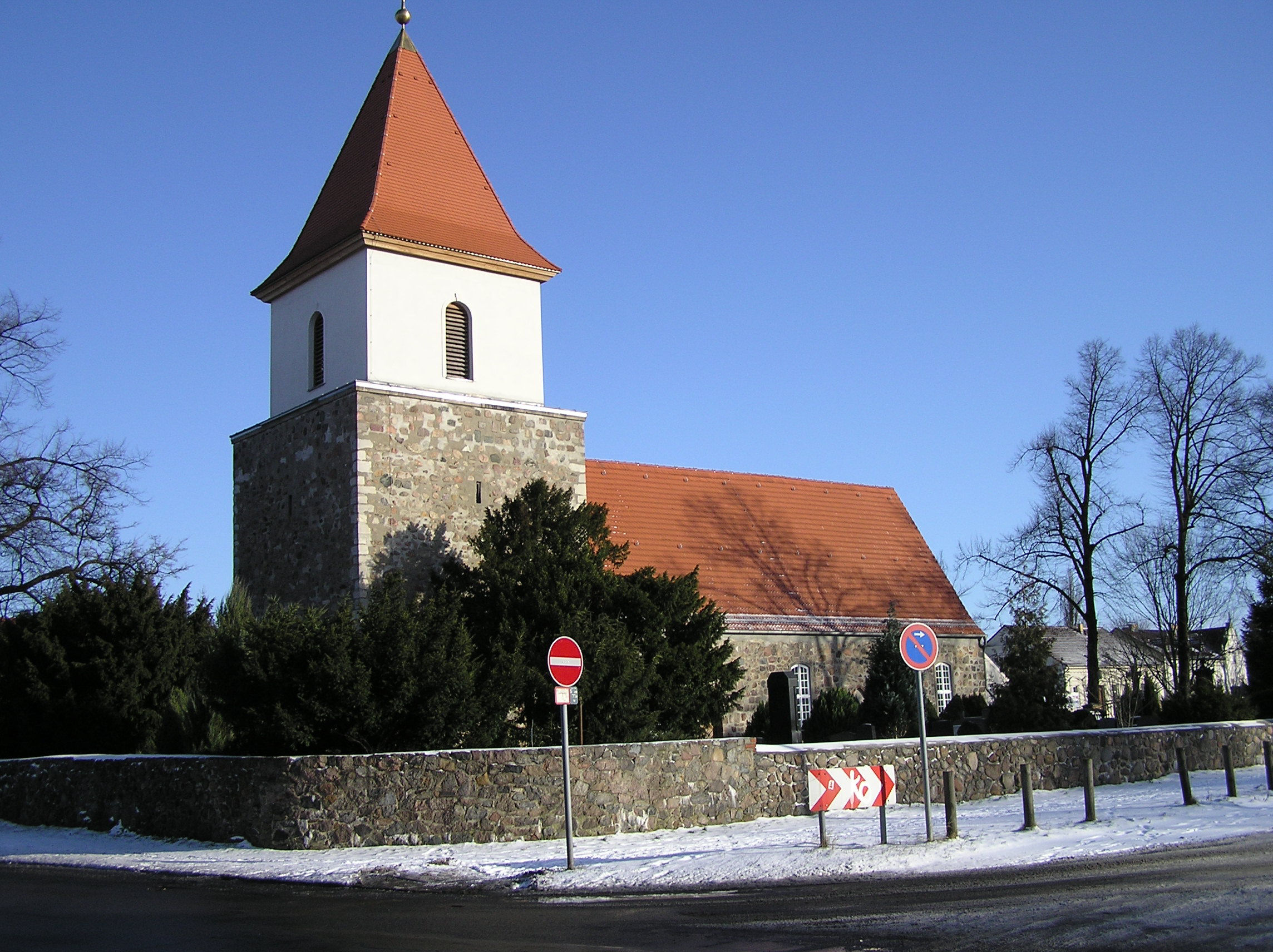 Blankenburg Kirche, Berlin